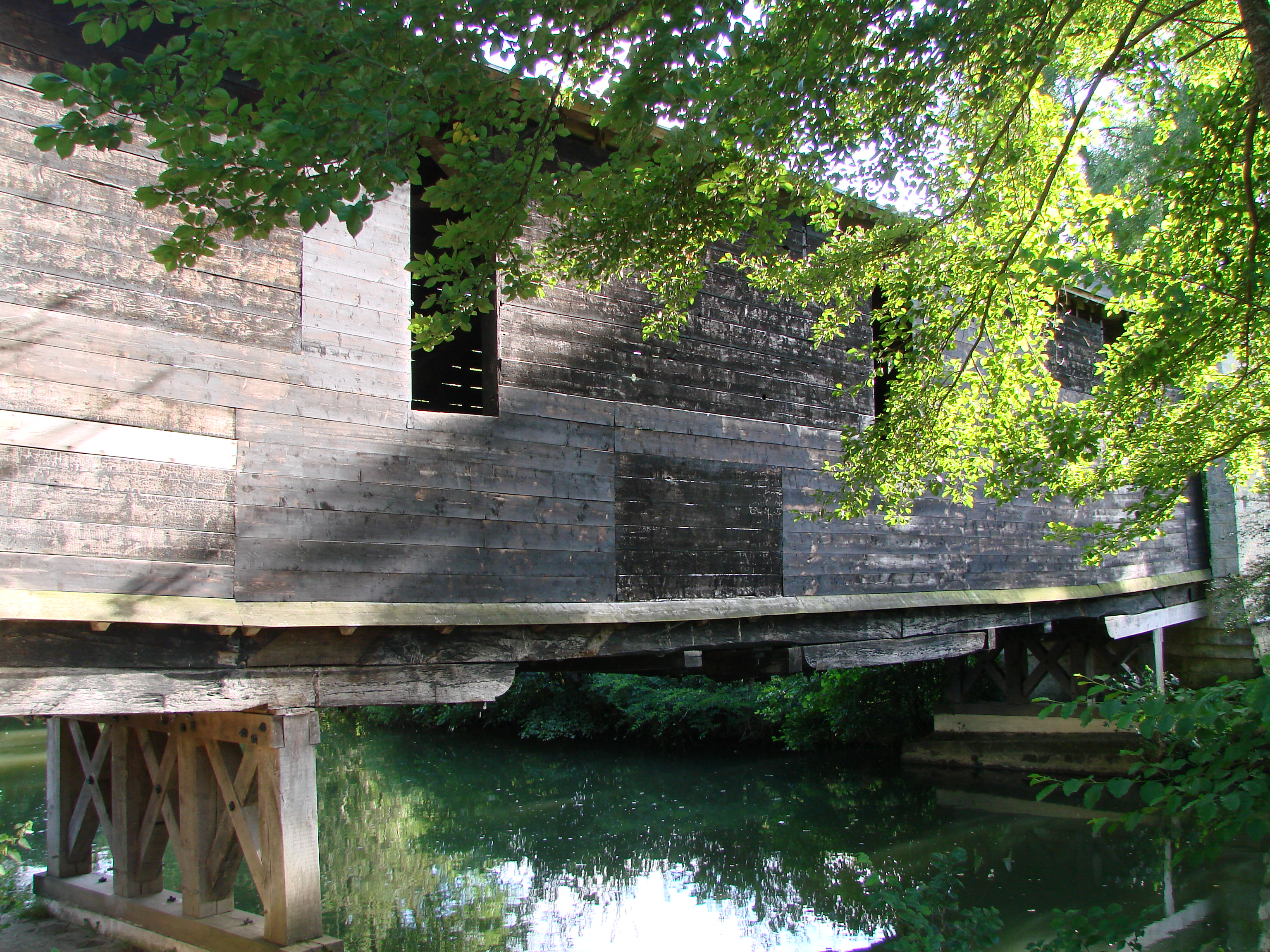 Le pont de bois couvert sur la rivière La Bouzanne, lieu dit Le Pont Renaud, commune de Le Pont-Chrétien-Chabenet, département de l'Indre, France.